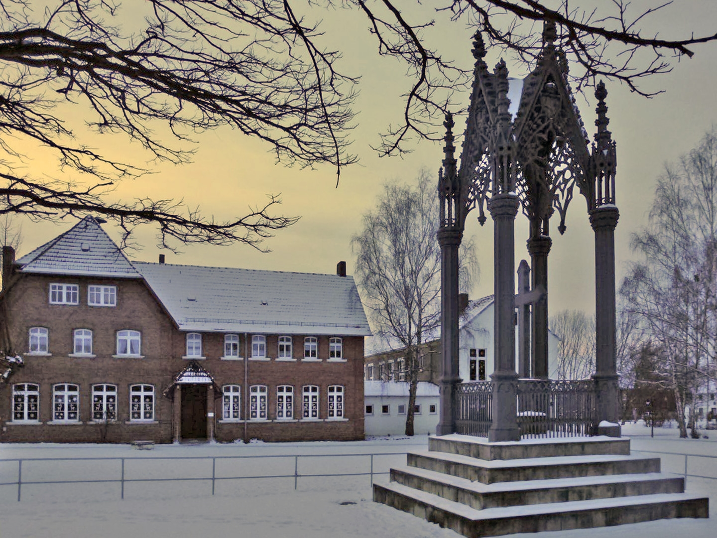 Scharnhorstschule und Backsteinbau des alten Schulgebäudes mit dem Denkmal für Prinz Leopold von Hessen-Homburg in Großgörschen